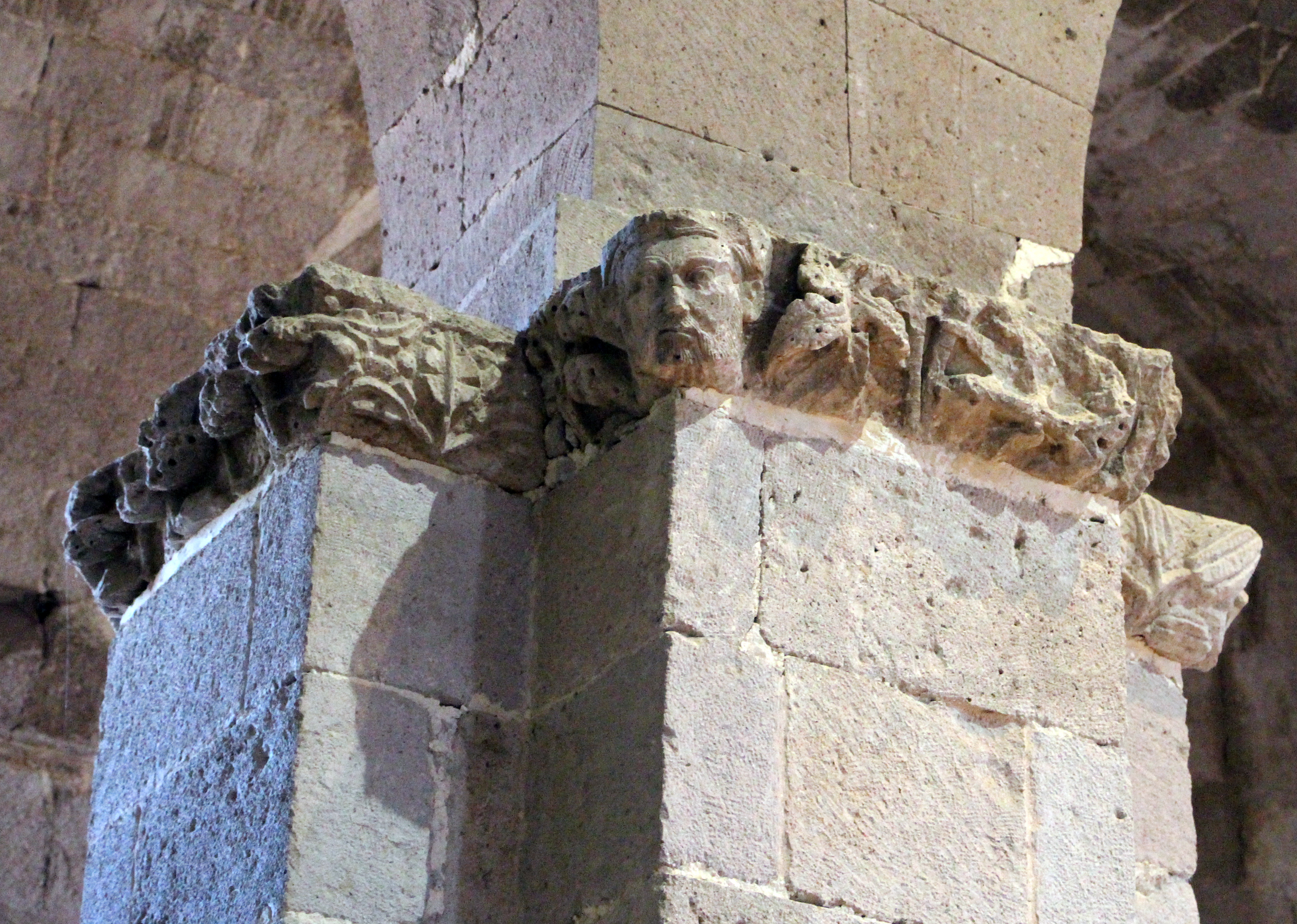 Sant'Antioco di Bisarcio (Ozieri)